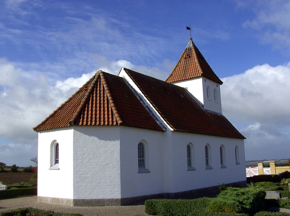 Agerø kirke (Morsø) - nordside